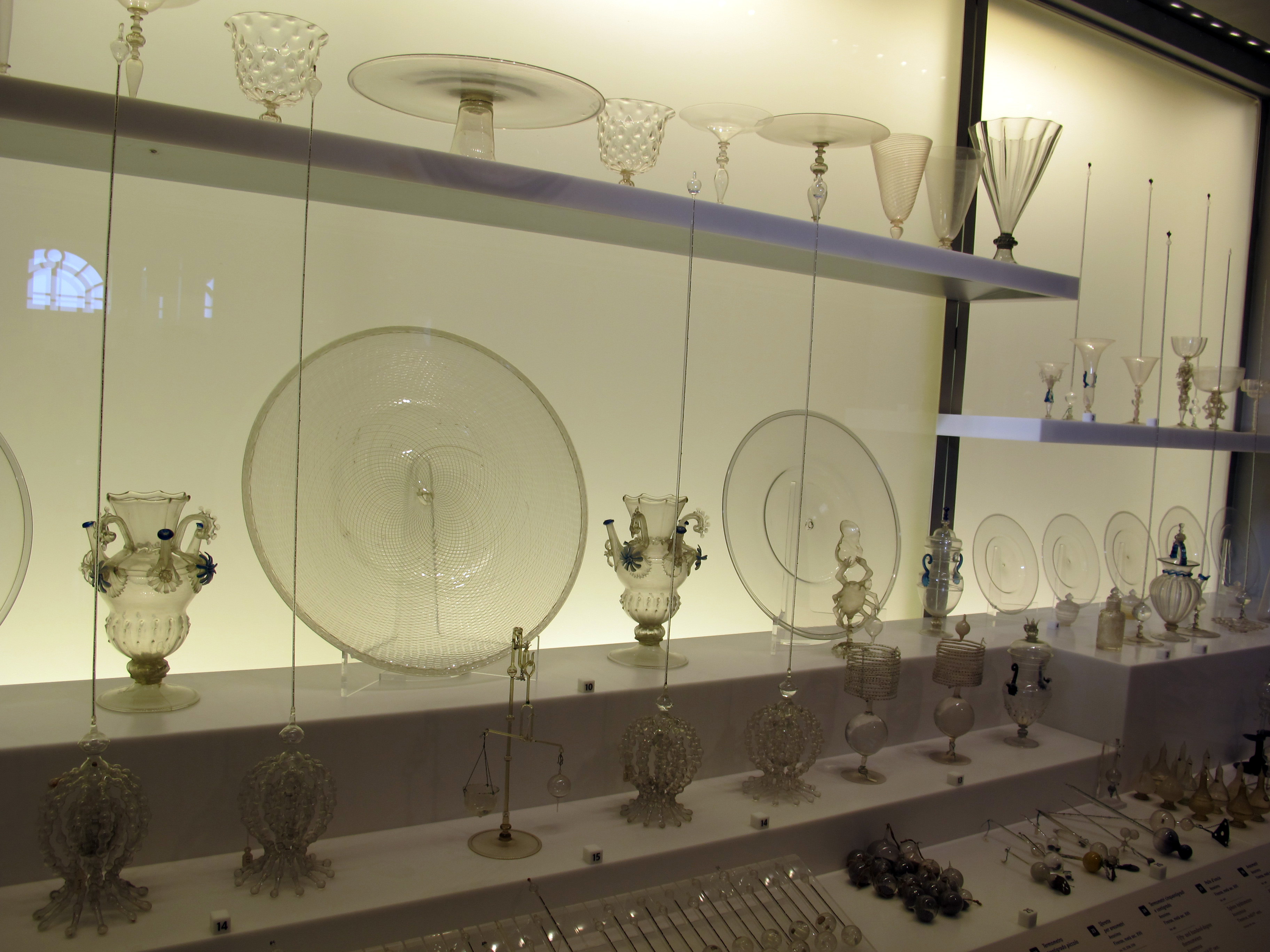 Museo Galileo, Firenze